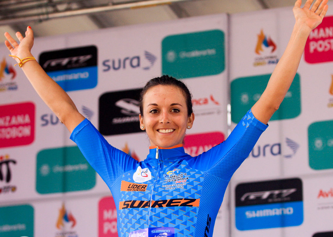 Diana Peñuela en la etapa 3 de la Vuelta a Colombia Fenenina 2017